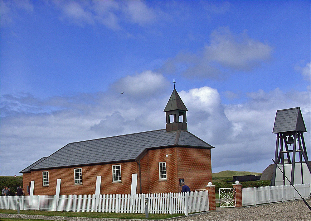 Thorsminde kirke, Holstebro, fra sydøst